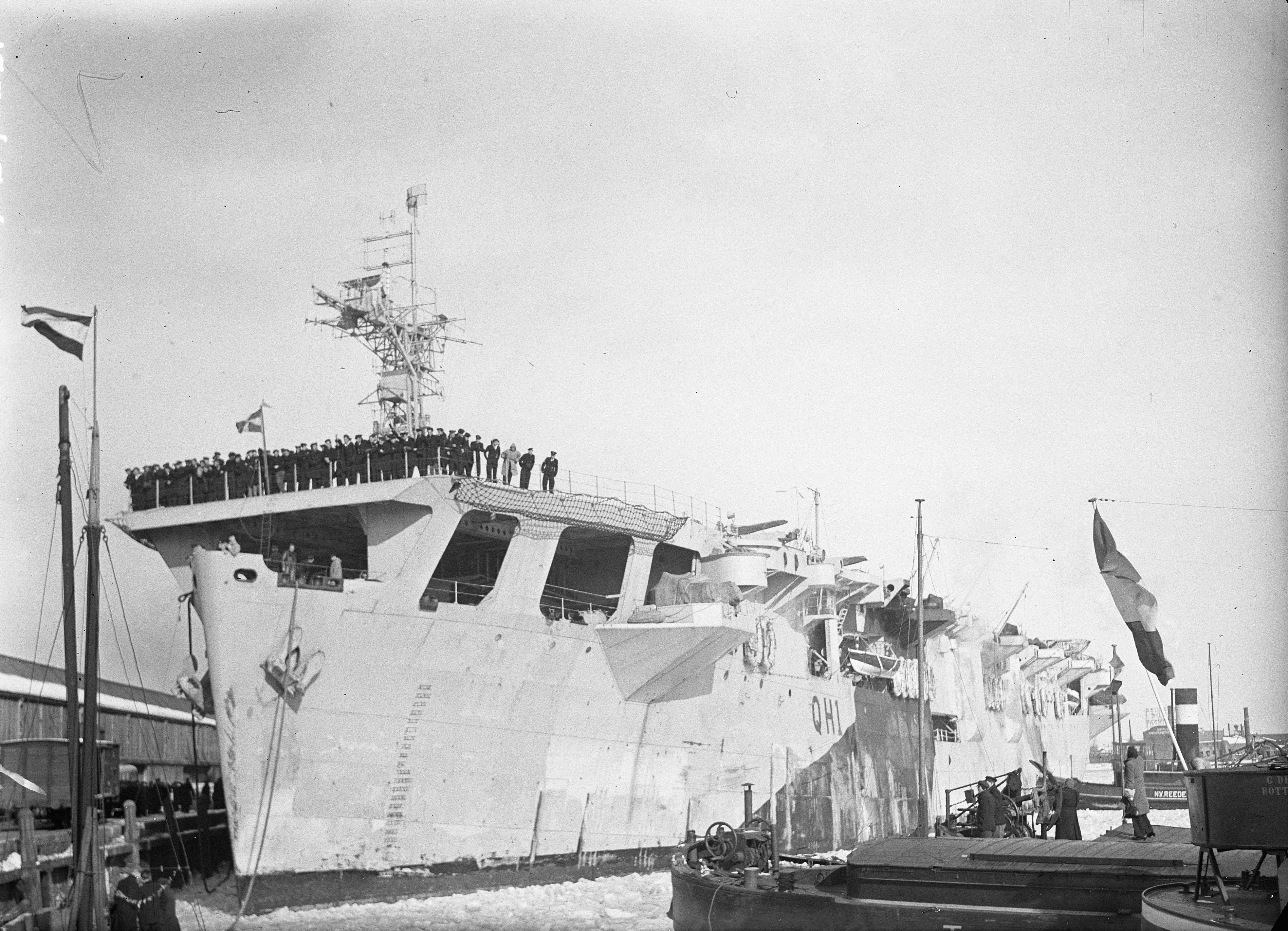 Collectie / Archief : Fotocollectie Anefo Reportage / Serie : [ onbekend ] Beschrijving : Hr. Ms. "Karel Doorman" terug in Holland Datum : 18 februari 1947 Locatie : Den Helder, Noord-Holland Trefwoorden : marine, schepen Fotograaf : Sagers, Harry / Anefo Auteursrechthebbende : Nationaal Archief Materiaalsoort : Glasnegatief Nummer archiefinventaris : bekijk toegang 2.24.01.09 Bestanddeelnummer : 902-0464